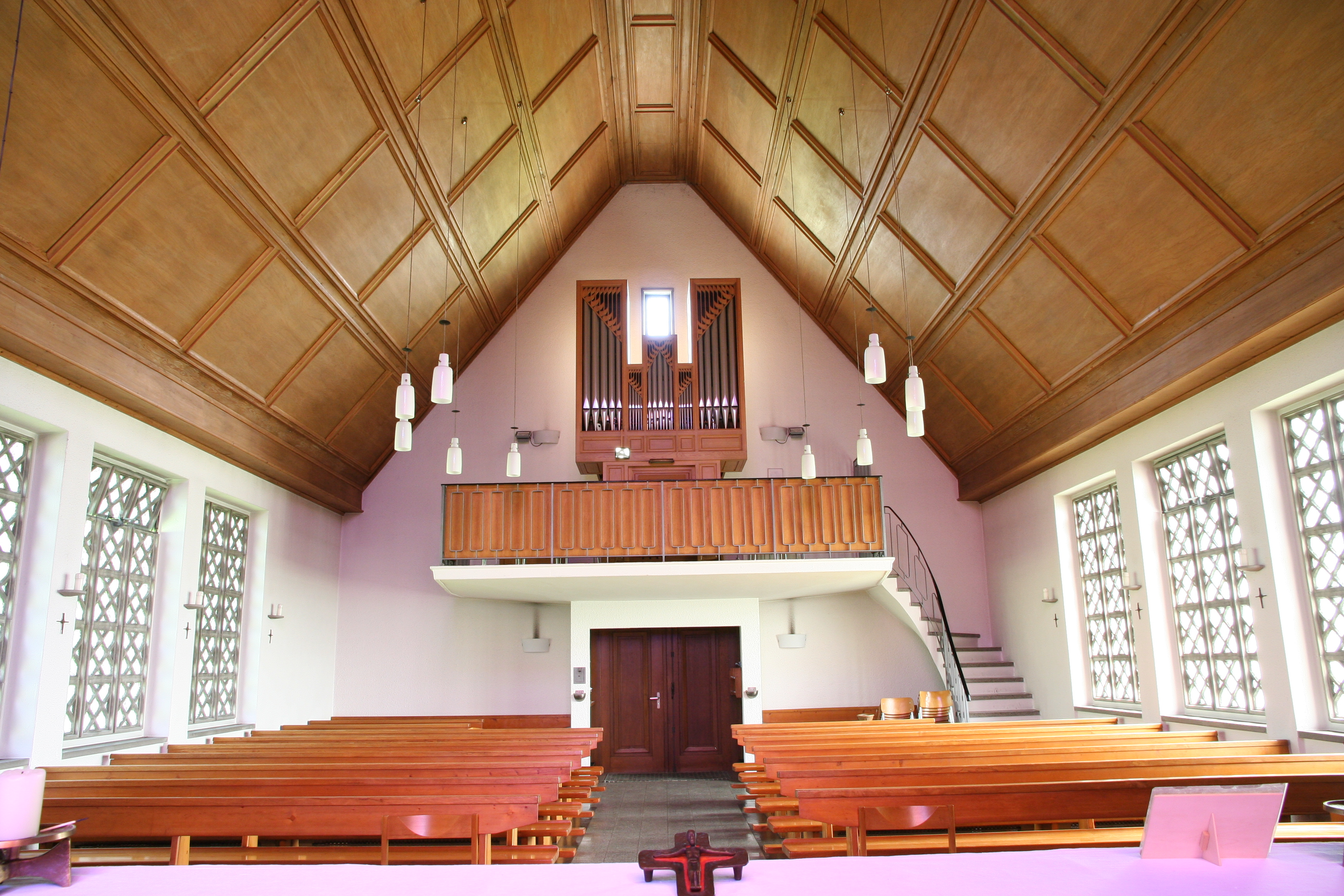 Römisch-katholische Kapelle St. Anna Wädenswil, Orgelempore